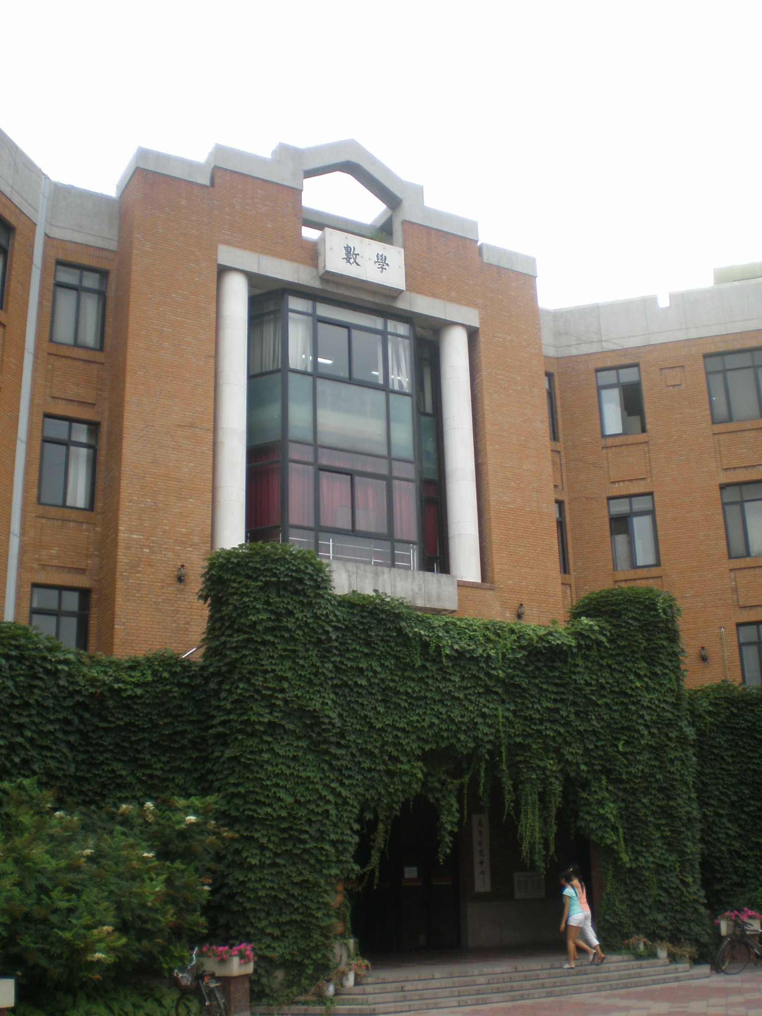 中文（中国大陆）: 清华大学数学楼